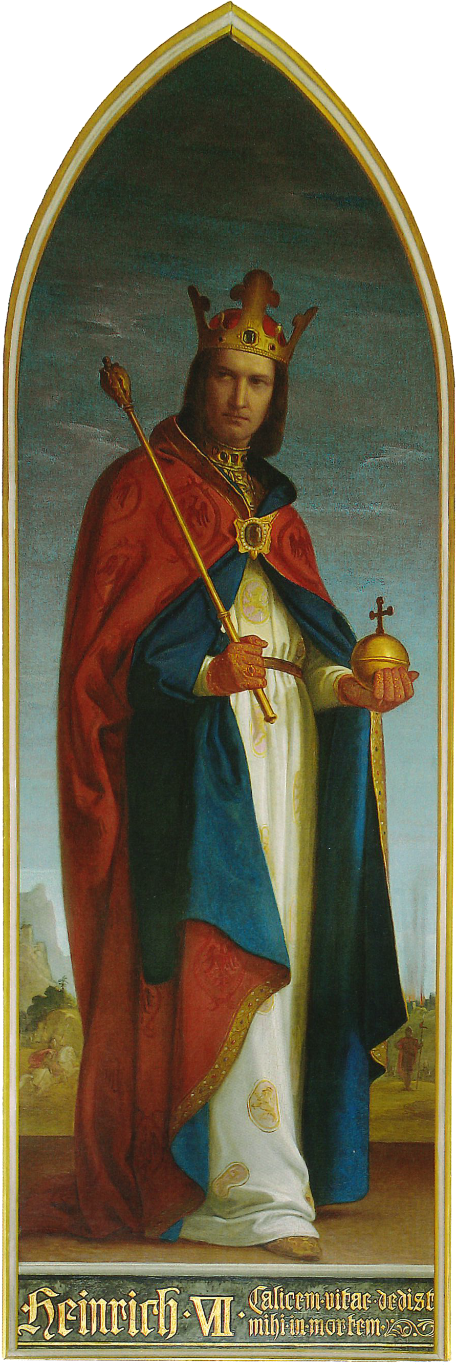 Gestiftet von König Wilhelm I. der Niederlande, Großherzog von Luxemburg. Das Gemälde ist Teil der Herrschergalerie im Kaisersaal des Hauses zum Römer im Frankfurter Rathaus und gehört zum Bestand des Historischen Museums Frankfurt am Main. Motto: Calicem vitae dedisti mihi in mortem.